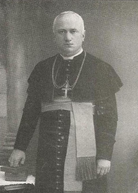 Karol Kmeťko (1875 - 1948), Slovenský římskokatolický hodnostář a československý politik